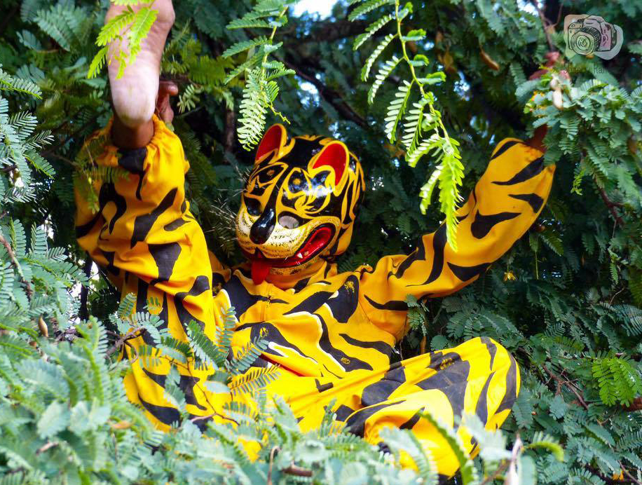 Danza del tigre o Tlaminque, bailada en la Costa Chica y Montaña de Guerrero